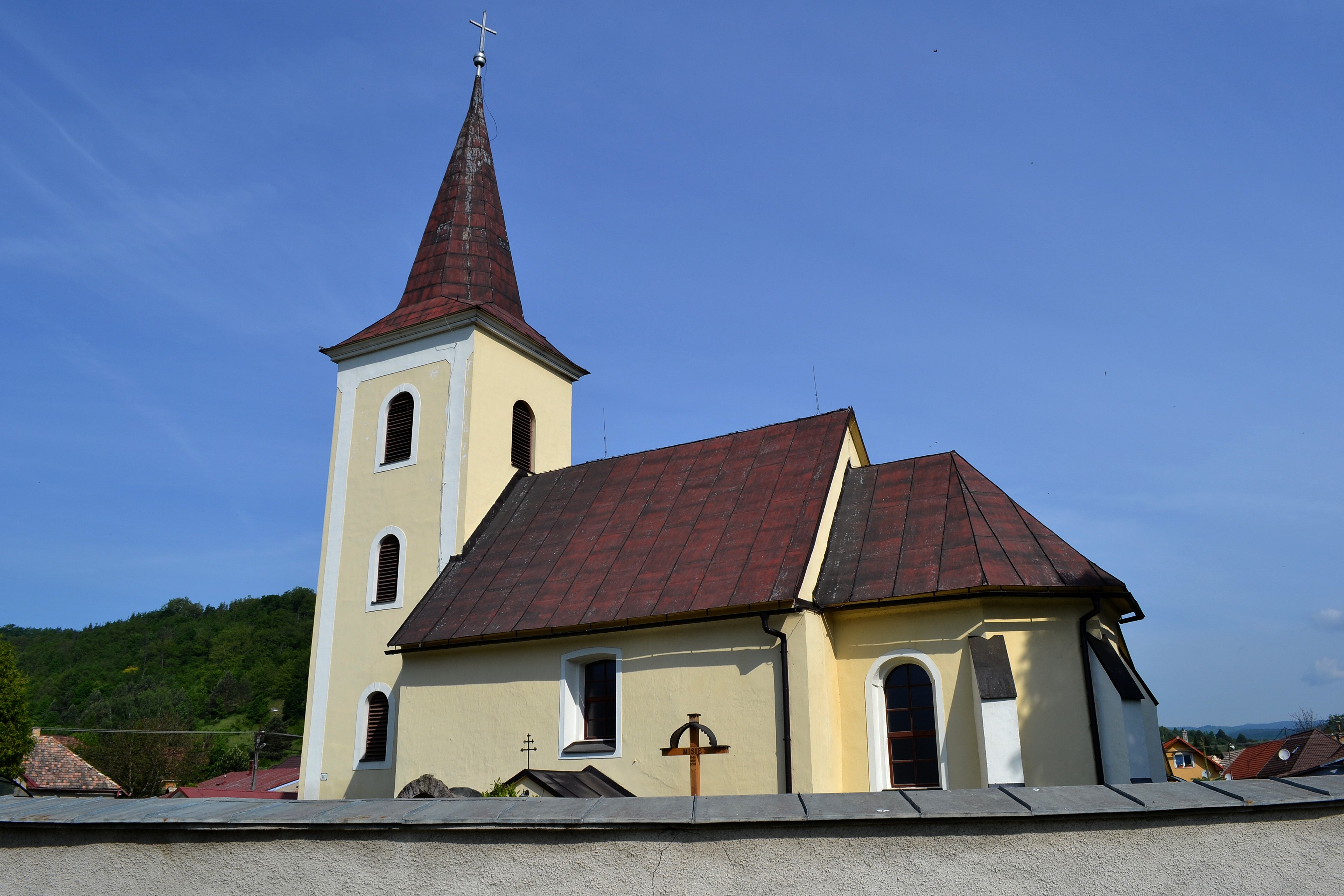 Budča (okr. Zvolen), Kostol svätého Michala archanjela; celkový pohľad z juhovýchodu